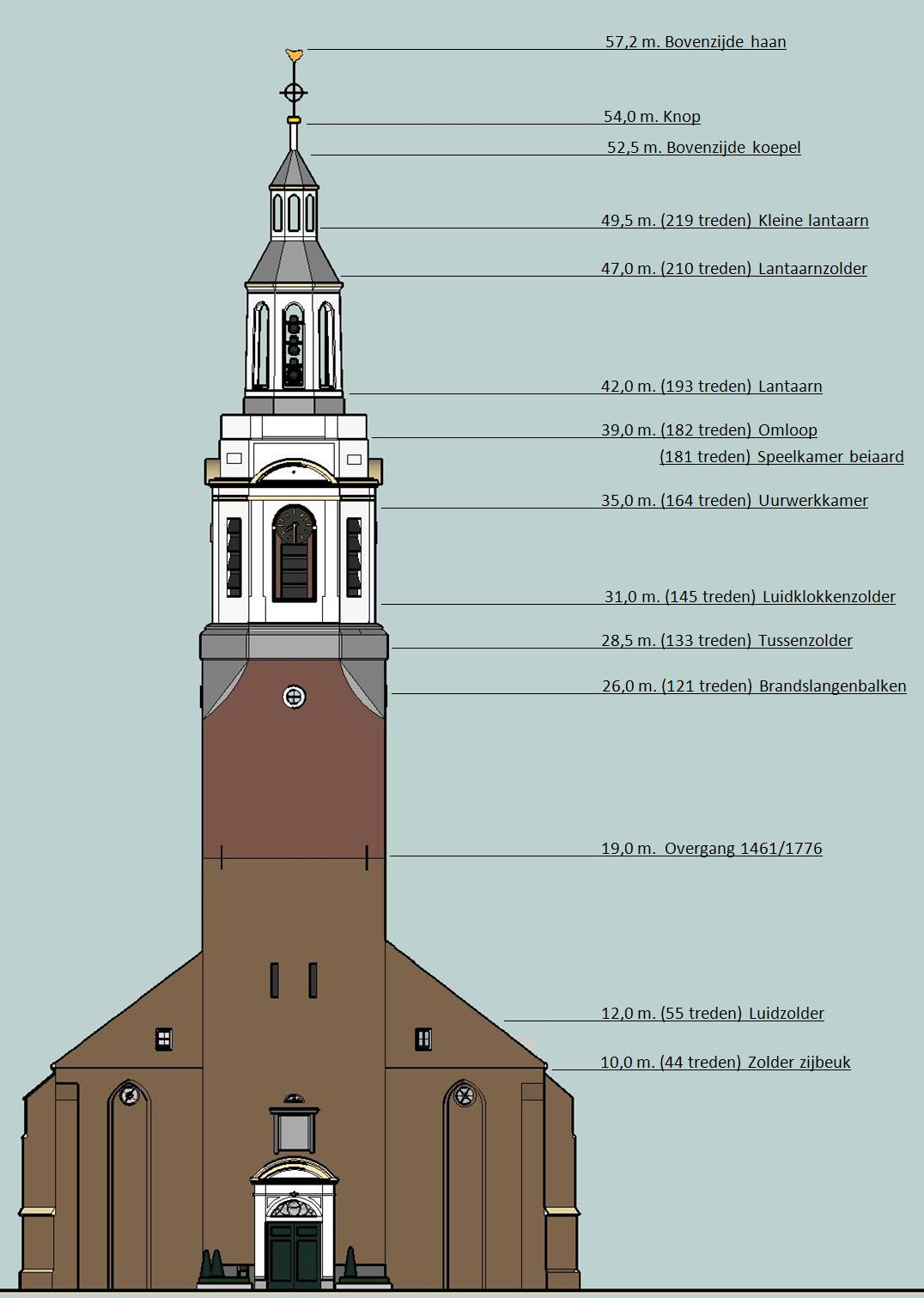 Schematische weergave van de torenindeling van de Grote kerk te Nijkerk.